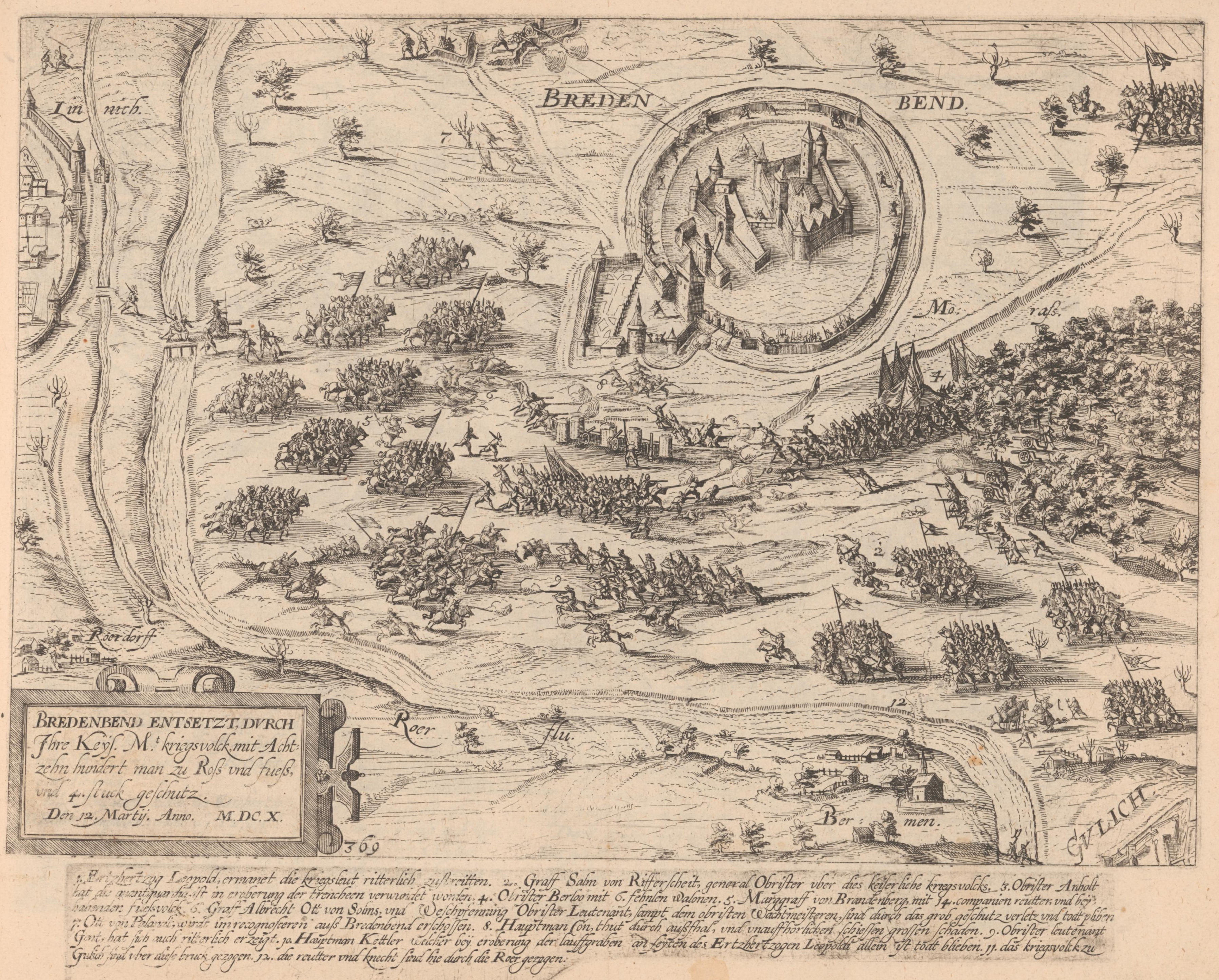 Stich der Festung Breitenbend